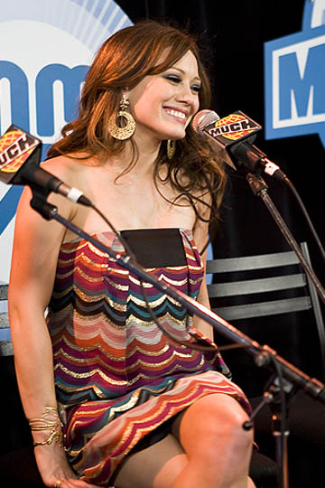 MMVAs